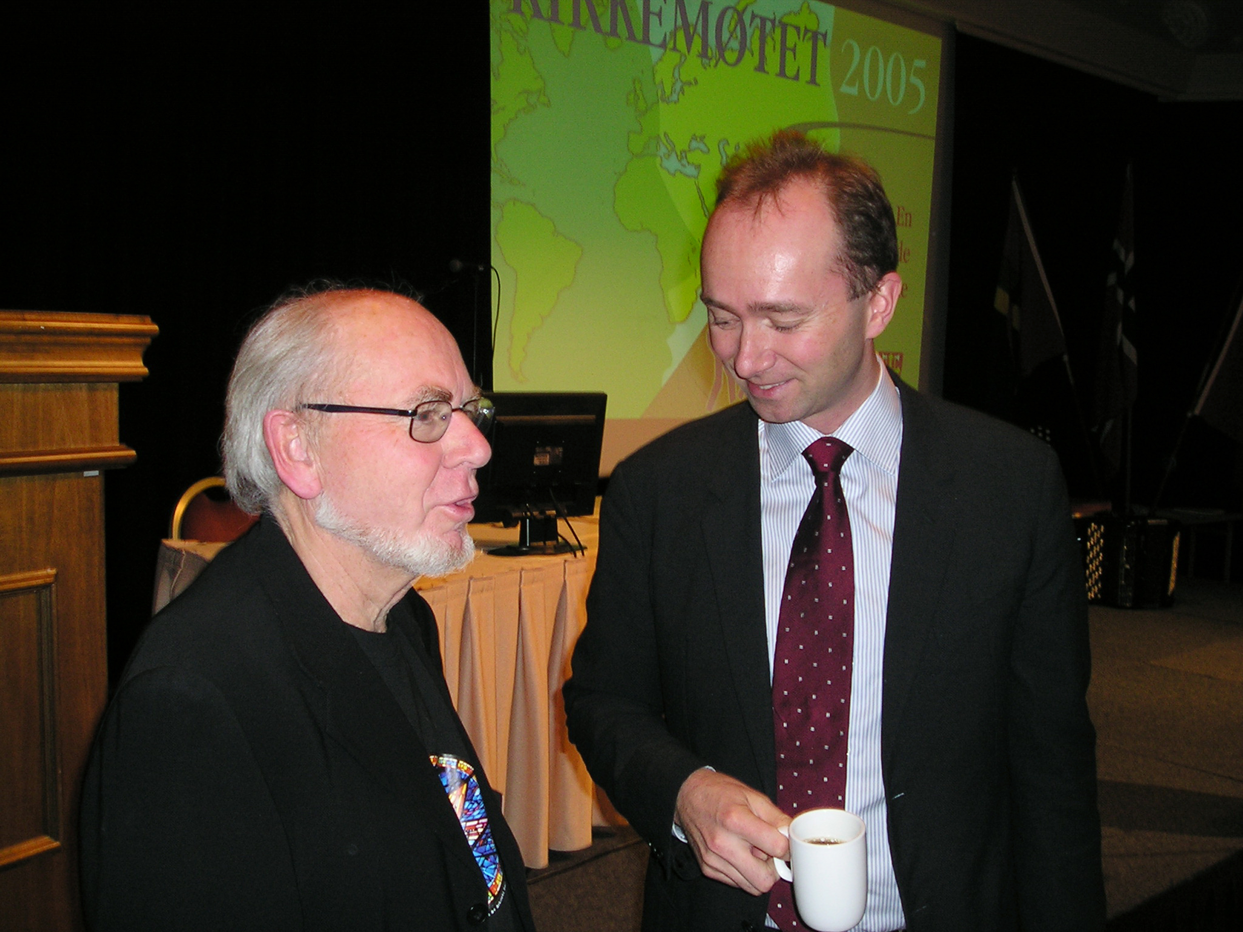 Thor Bjarne Bore og Trond Giske under Kirkemøtet 2005